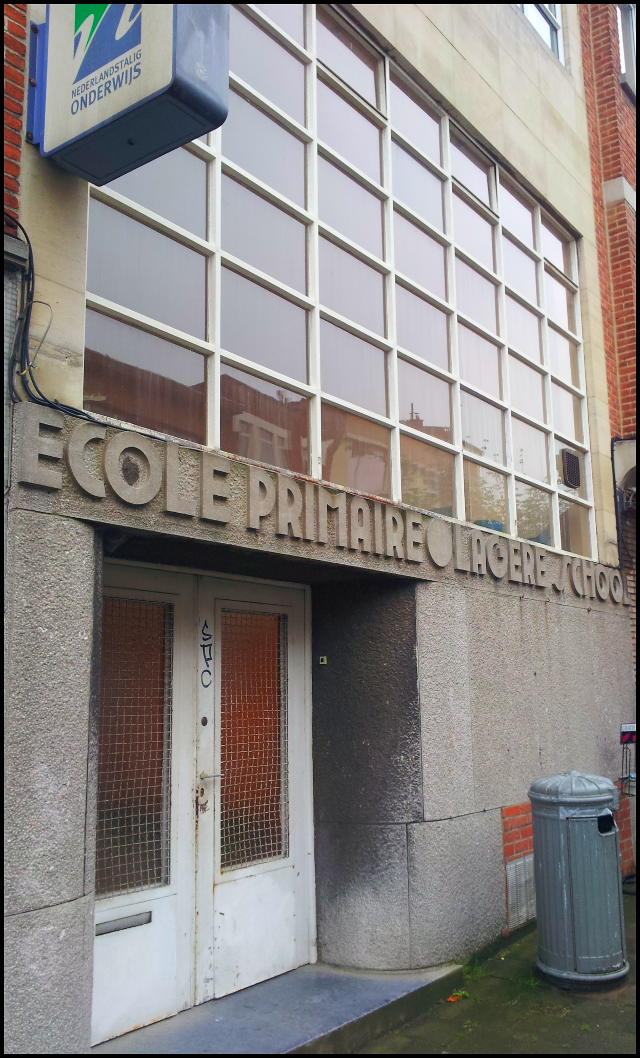 Ecole de l'architecte Charles Van Nueten,1936